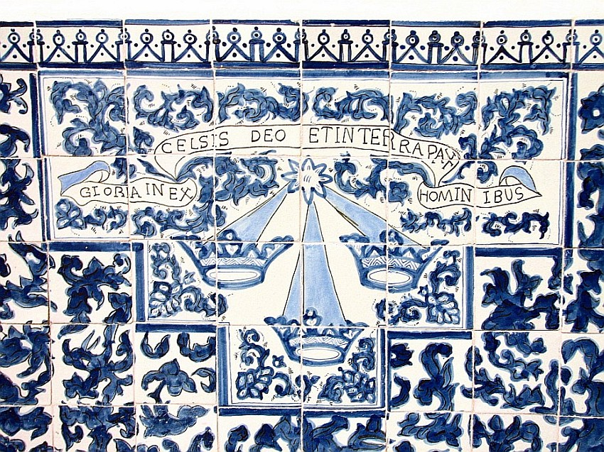 Imagen de un mosaico en la pared del edificio, donde se ubica el MIDE, en la ciudad de México, que muestra al símbolo de la orden de los Betlemitas